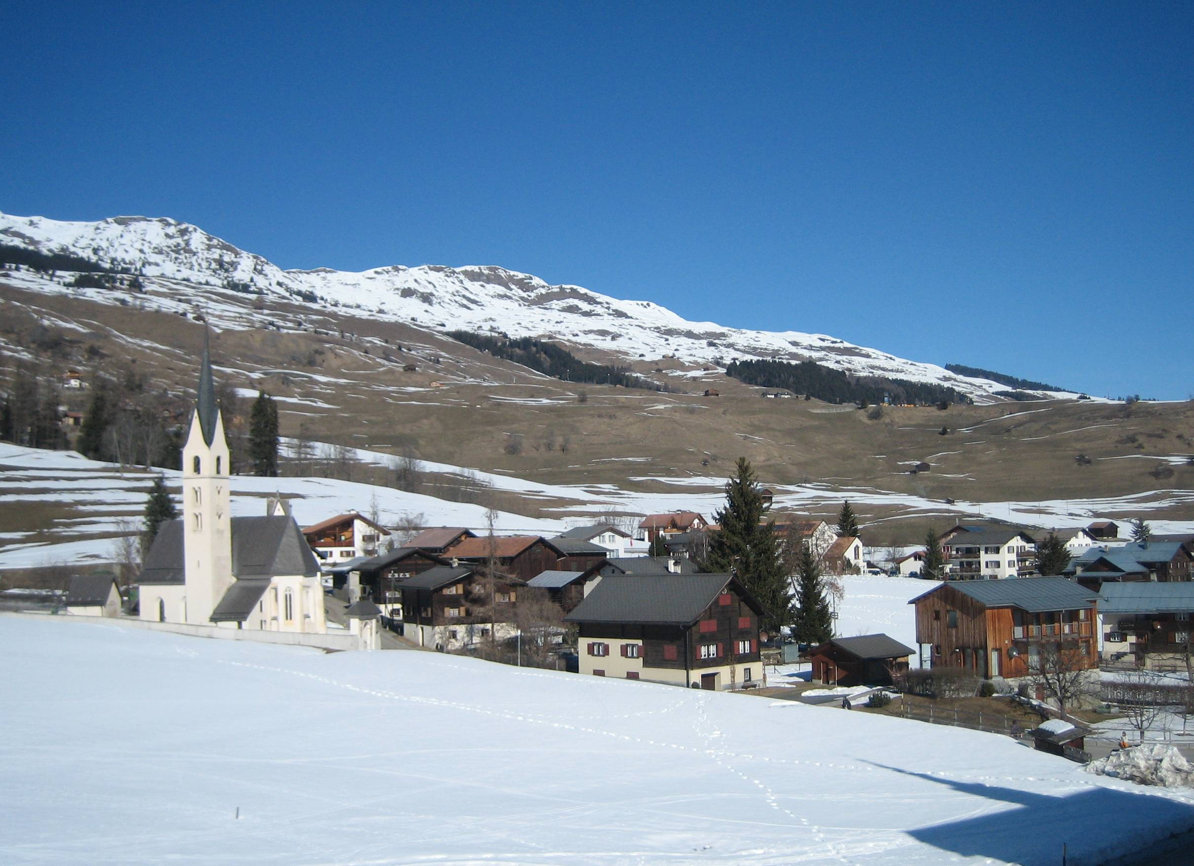 Degen